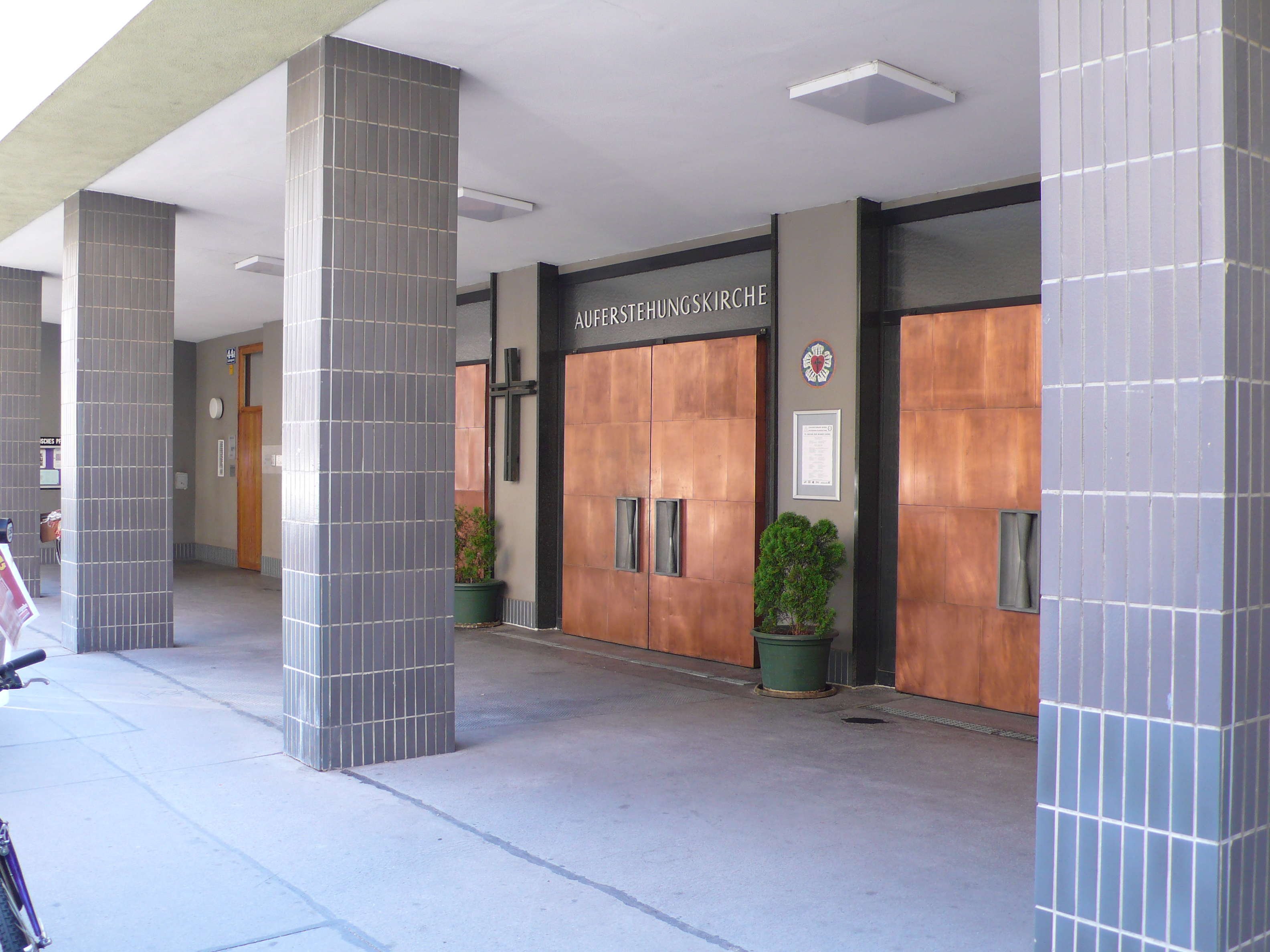 evangelische Auferstehungskirche, Wien VII., Lindengasse 44